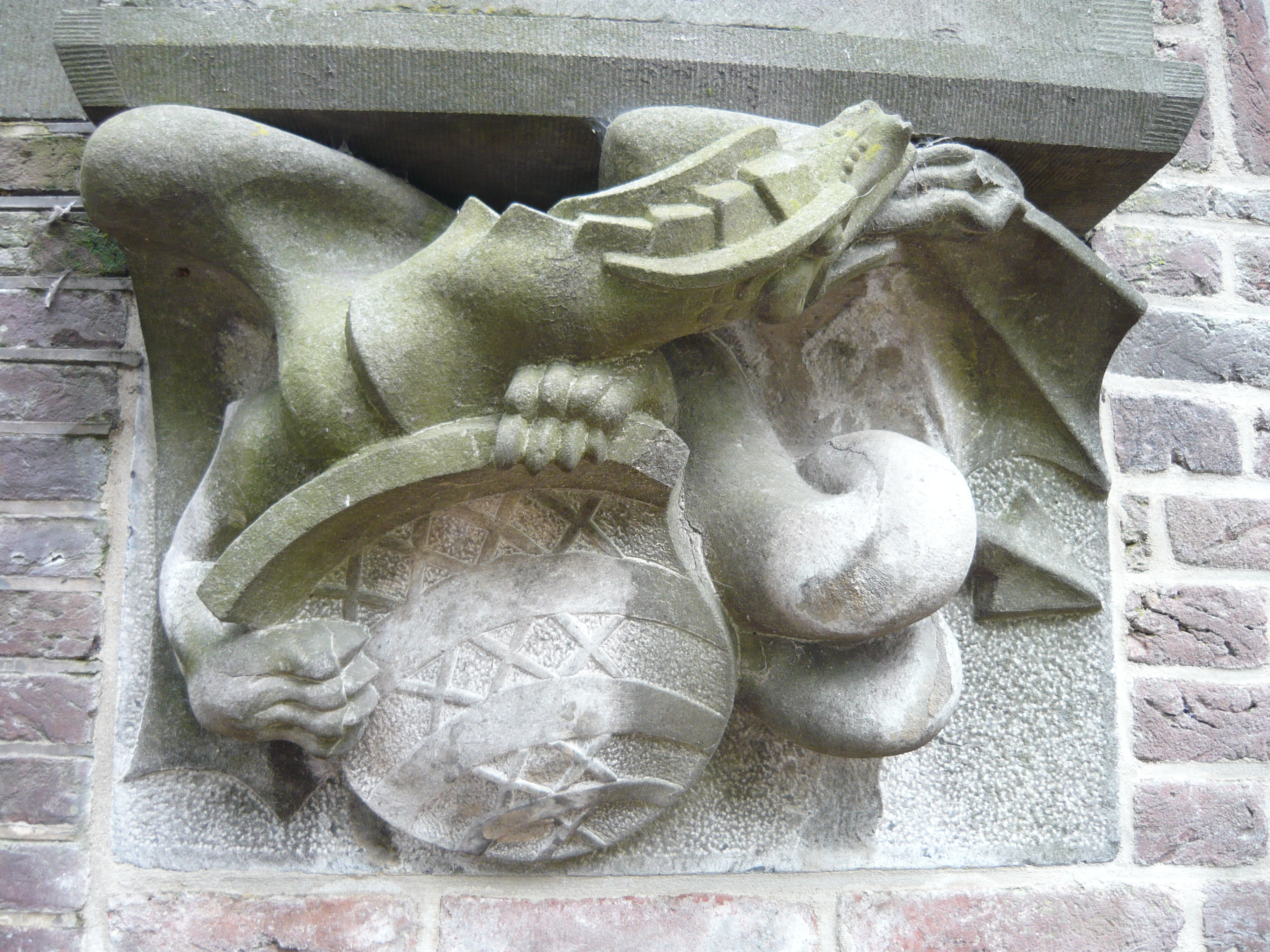 Lantaarnconsole te Utrecht "Drakenburgh", geplaatst Oudegracht 114 te Utrecht, vervaardigd door Jeanot Bürgi.